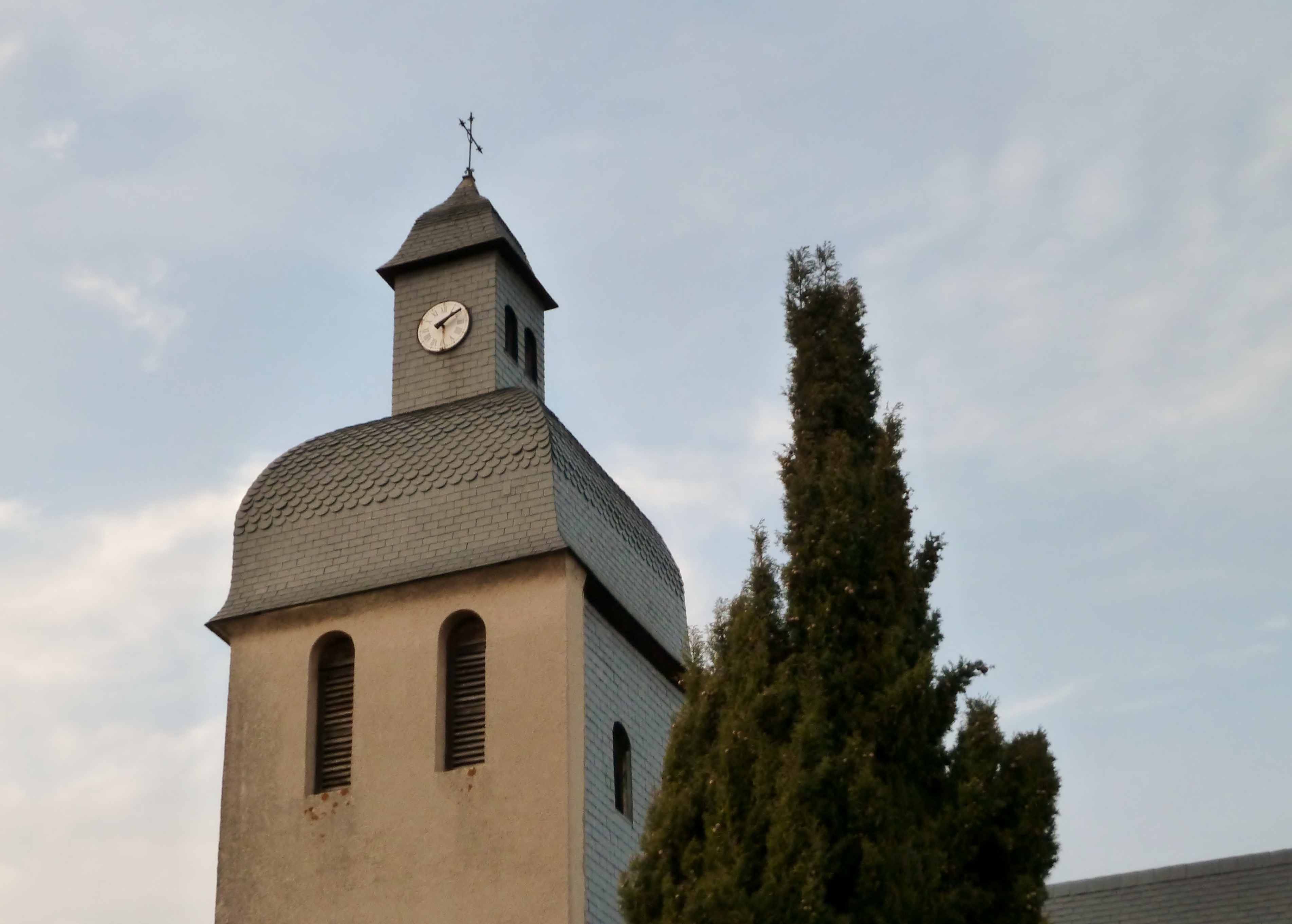 Clocher de l'église d'Argelos (Pyrénées-Atlantiques)